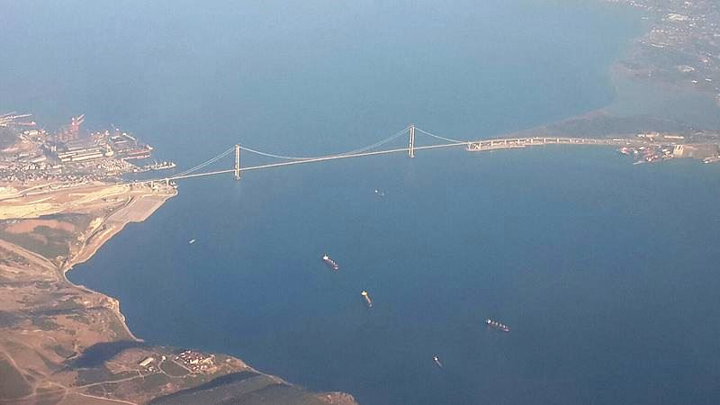 Osmangazi Köprüsü'nün uçaktan fotoğrafı Osmangazi Bridge from airplane